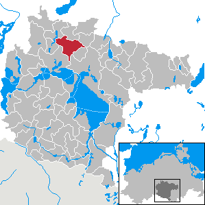 Grabowhöfe in Mecklenburg-Western Pomerania - District Müritz